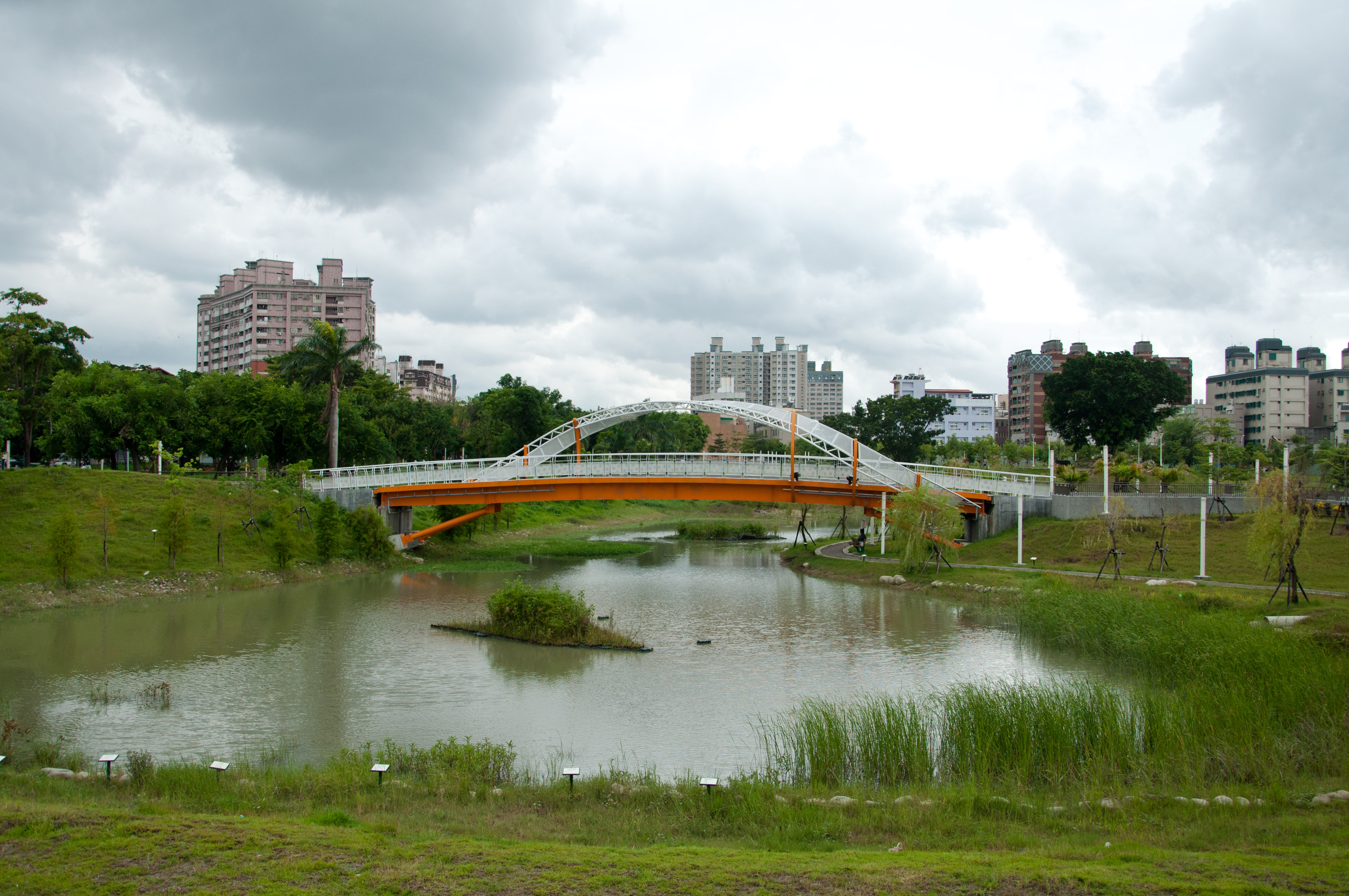 臺灣高雄右昌森林公園內滯洪池